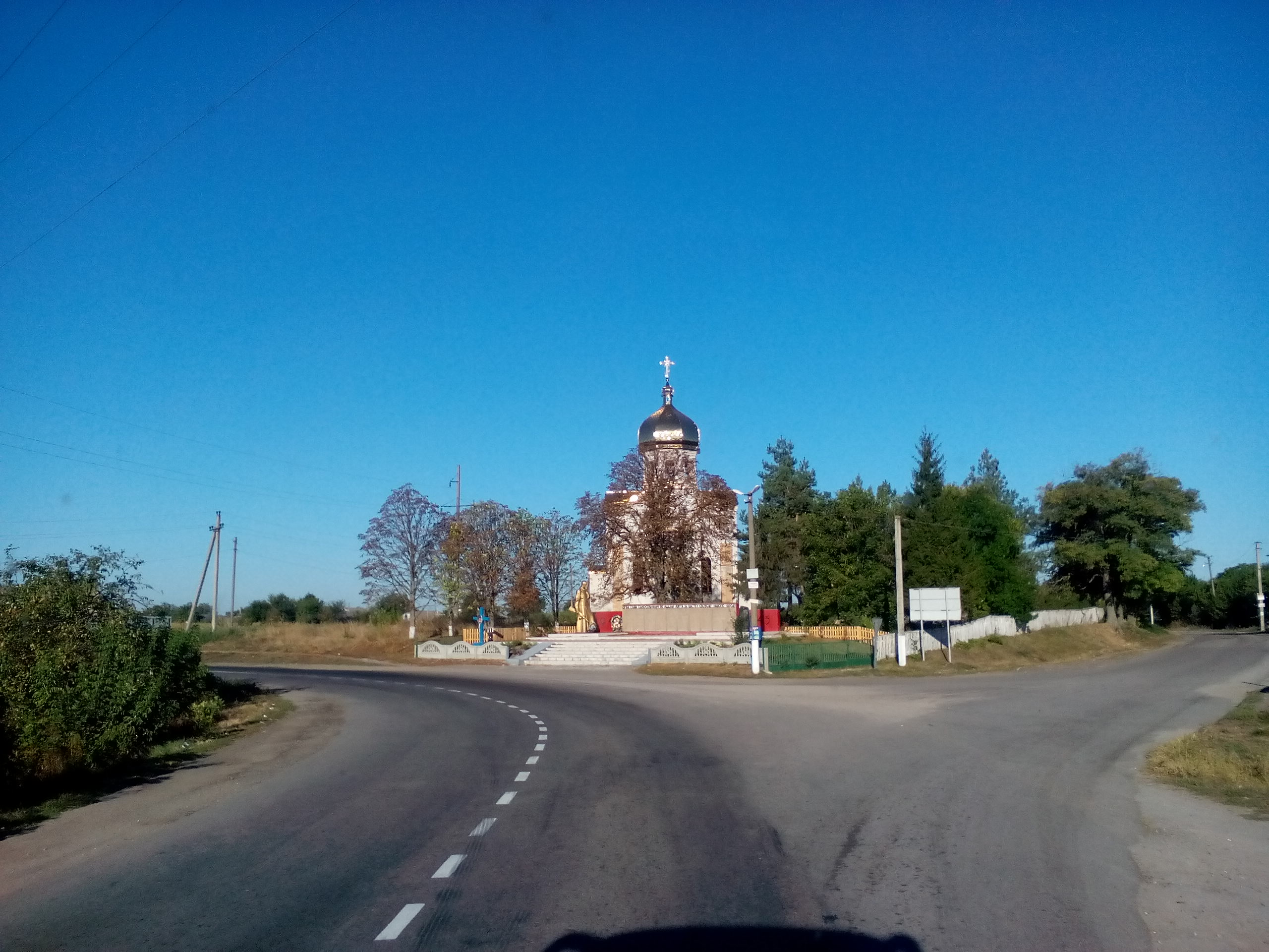 Село Маслівка Миронівського району Київської області